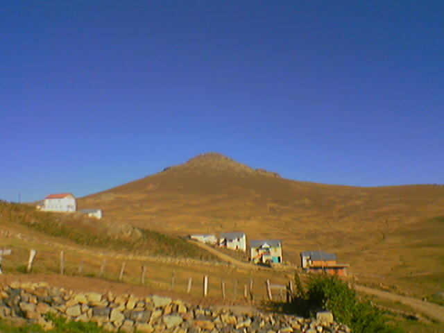 fotğrafı ben çektim